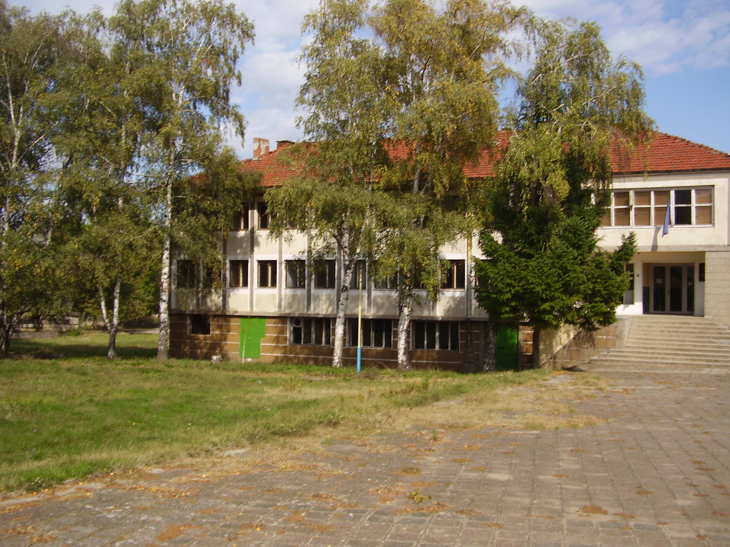 Кметството на село Граница, България